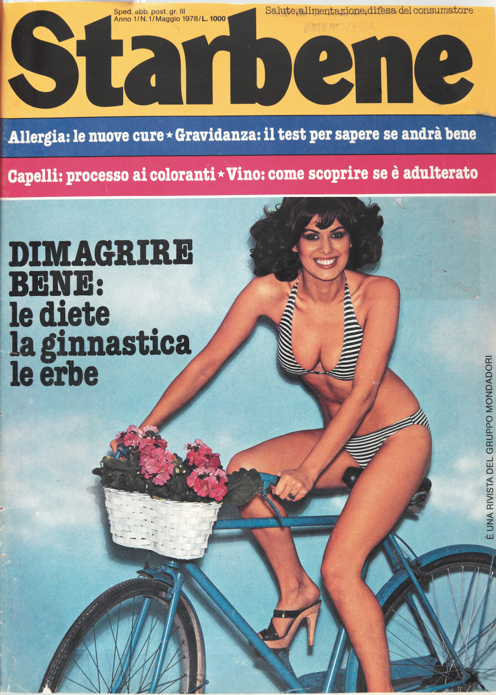 Copertina della rivista Starbene n. 1 maggio 1978, Arnoldo Mondadori Editore.